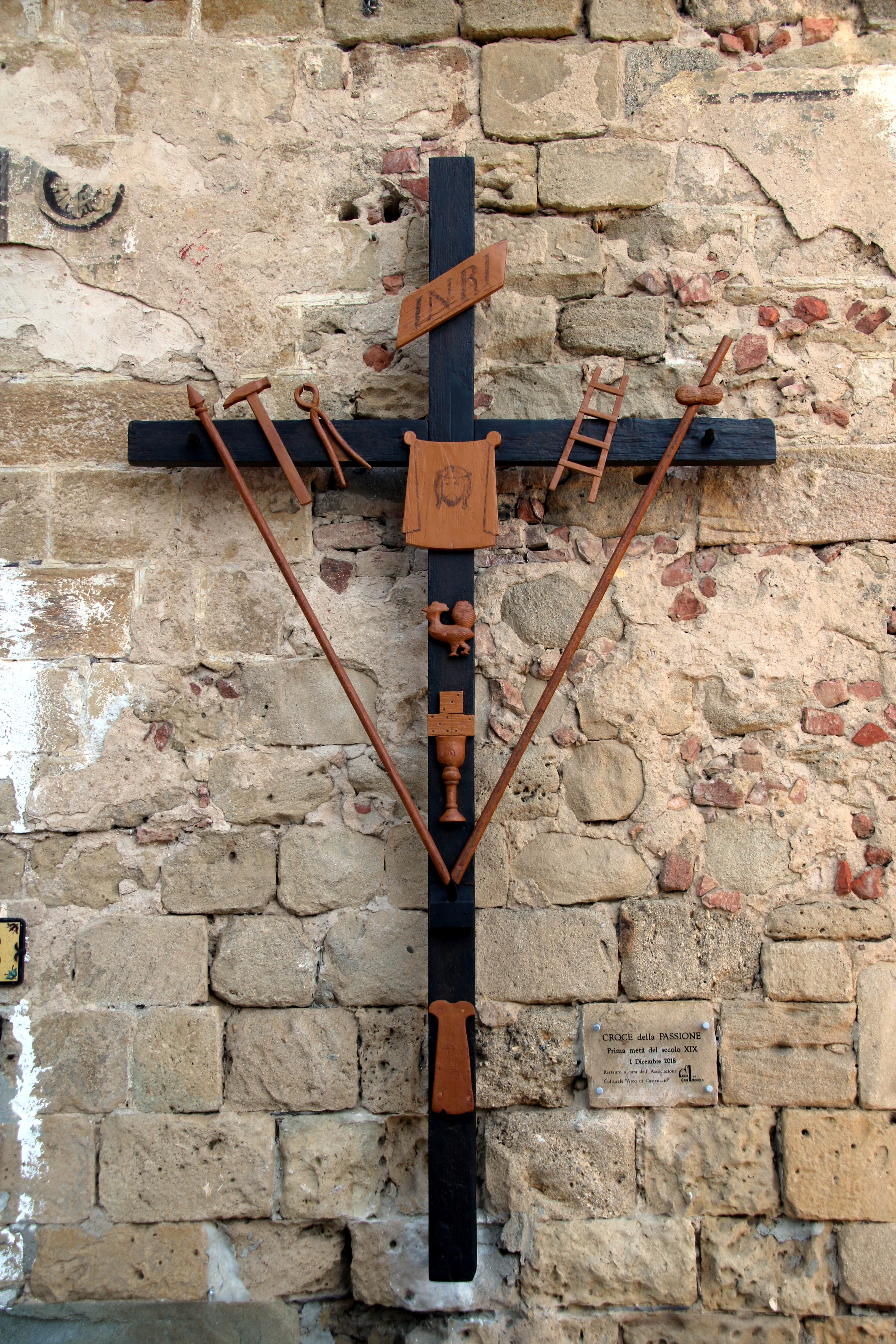 Croce della Passione, prima metà del secolo XIX (Montopoli in Val d'Arno)